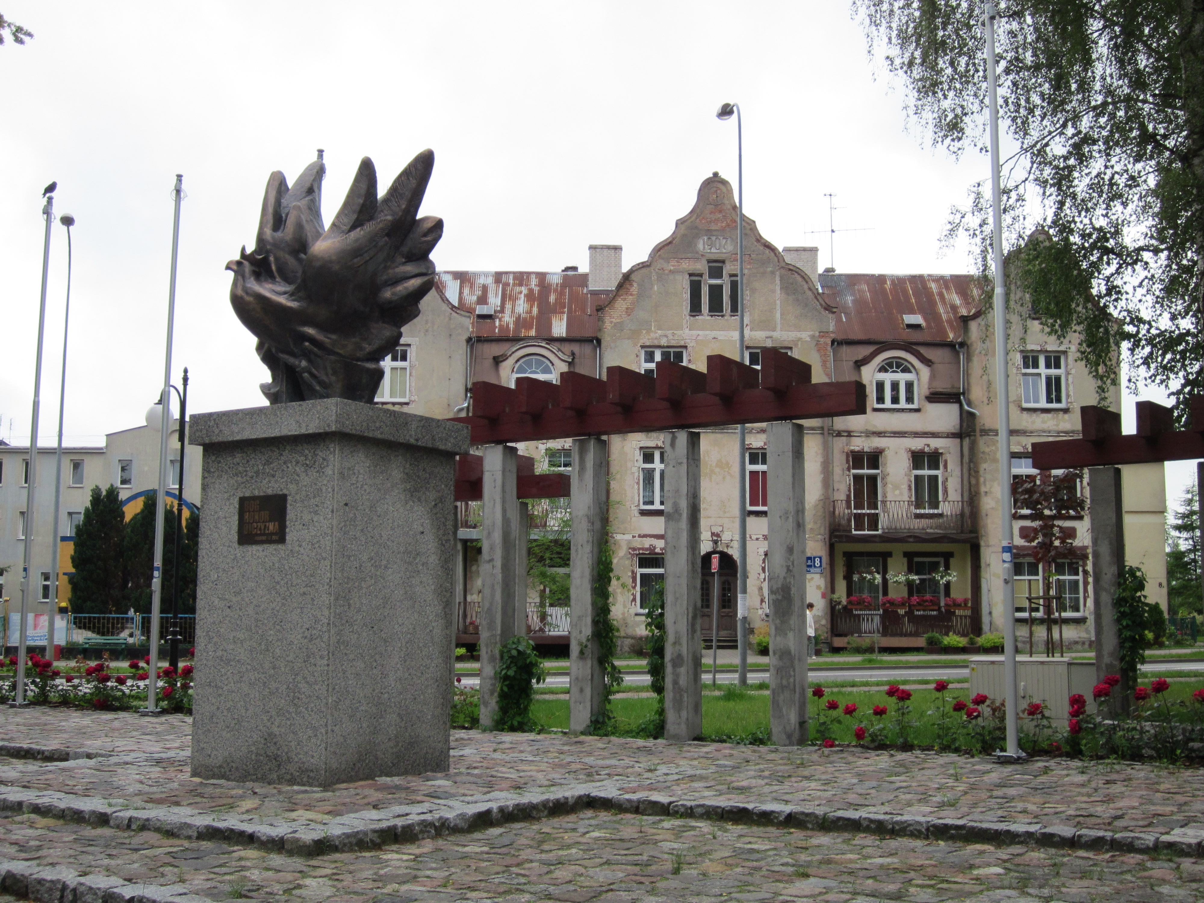 Pomnik ten został odsłonięty w 2012 r. Znajduje się pomiędzy ul. Grunwaldzką a Kazimierza Wielkiego. W oddali znajduje się ciekawa kamienica z 1907 r.